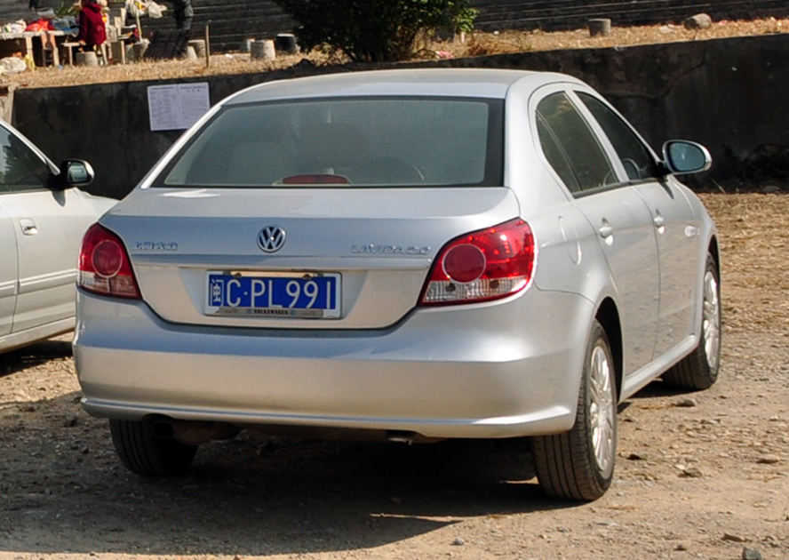 Volkswagen Lavida, rear view